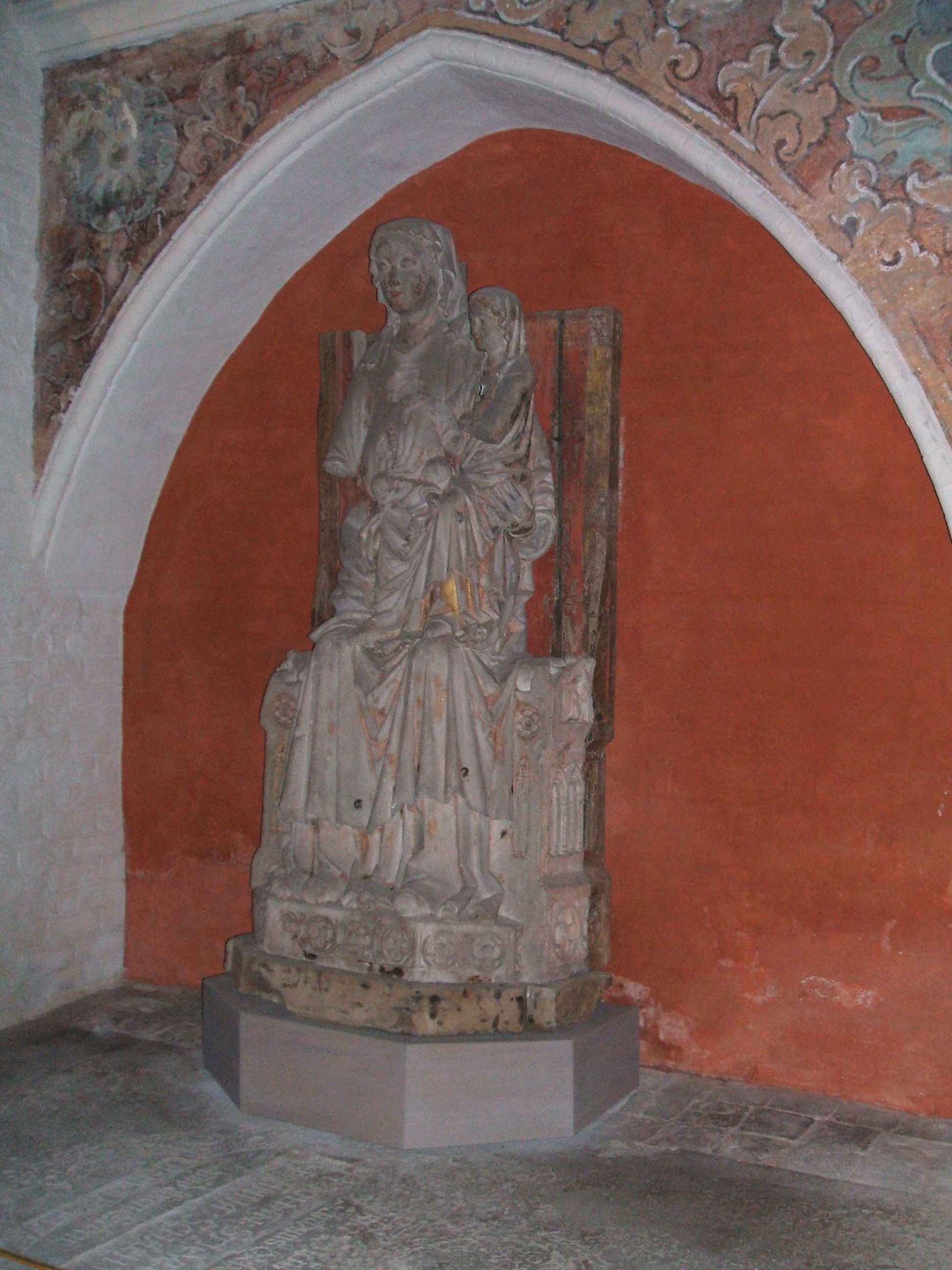 Anna selbdritt in der Stralsunder Nikolaikirche, mit sichtbarer Malerei darüber